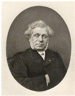 Retrato de Alphonse Lavallée (1791–1873)